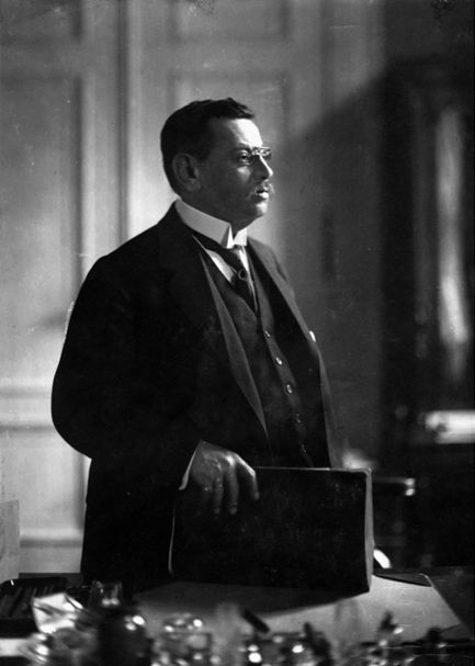 Reich Commissioner Hugo Preuss, aus dem Bundesarchiv